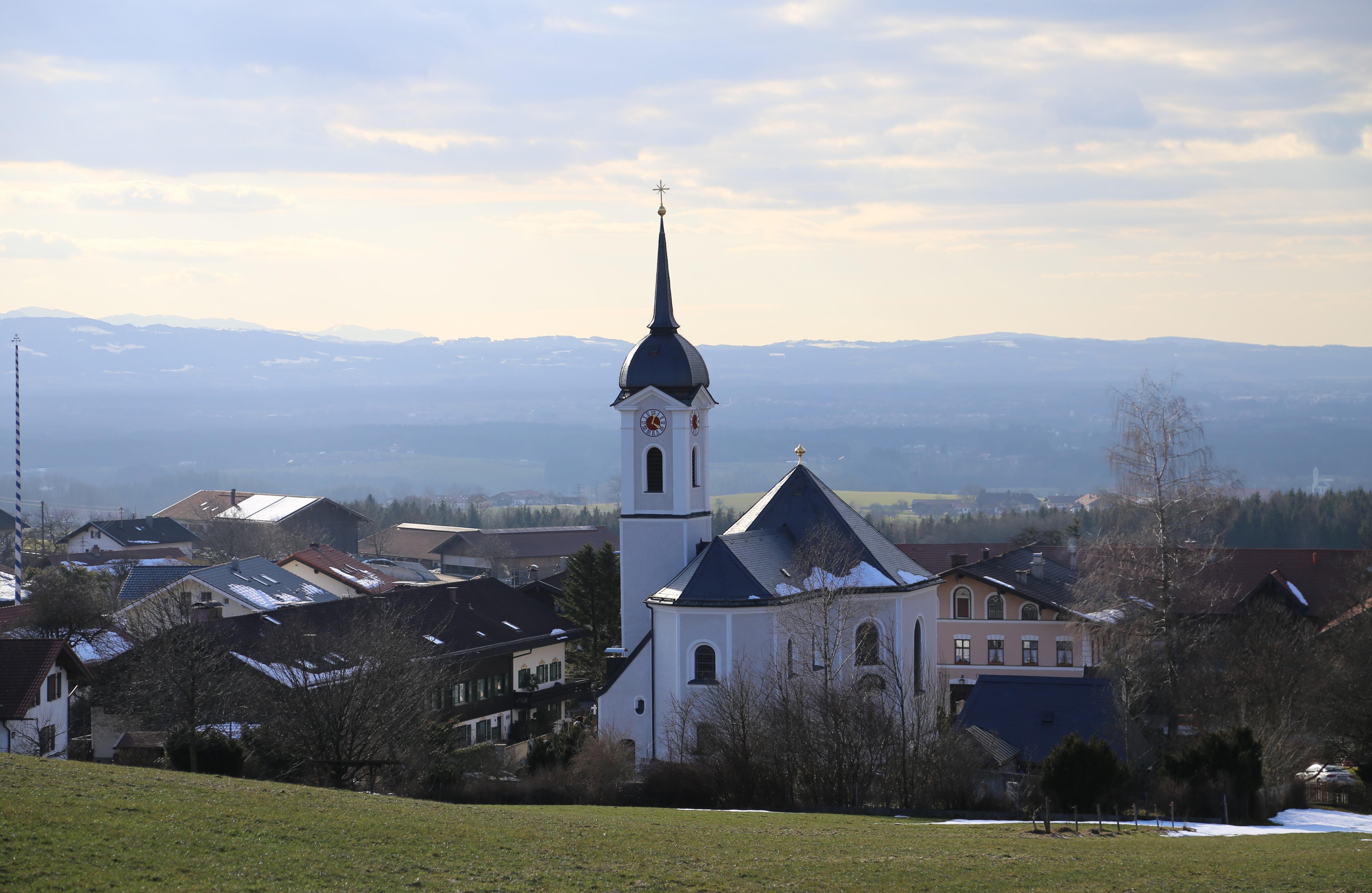 Endorfer Straße 16, Söllhuben; Kath. Pfarrkirche St. Rupert und Martin, zentralisierender Saalbau mit doppelstöckiger Sakristei und Südturm mit Haubendach, spätbarock, 1766-69 nach Plänen von Johann Michael Fischer unter Verwendung des spätgotischen Vorgängerturms und eines Sakristeibaus von 1673 durch Georg Steindlmüller d.Ä. Errichtet, 1955-56 Aufstockung der Sakristei; mit Ausstattung.